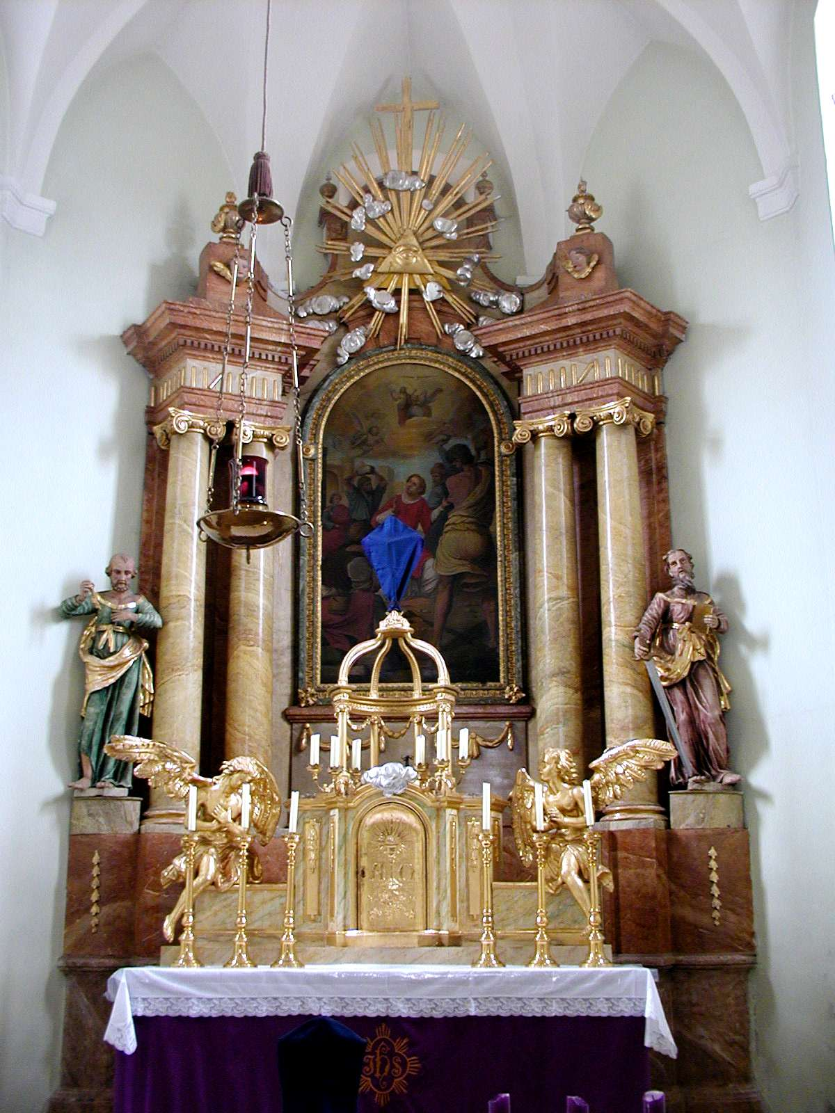 Hochaltar der Pfarrkirche Frauendorf an der Schmida